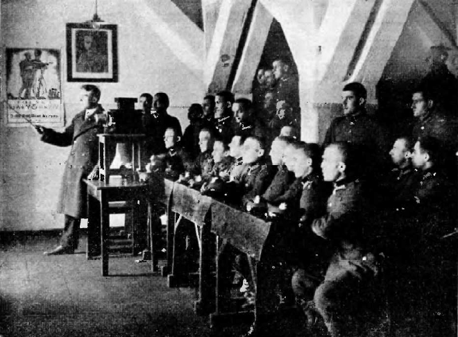 Działalność statutowa Polskiego Białego Krzyża. Nauka historii Polski.